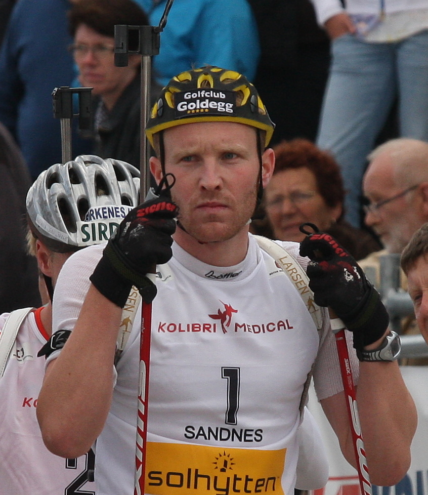 Simon Eder under Blinkfestivalen i Sandnes 2009